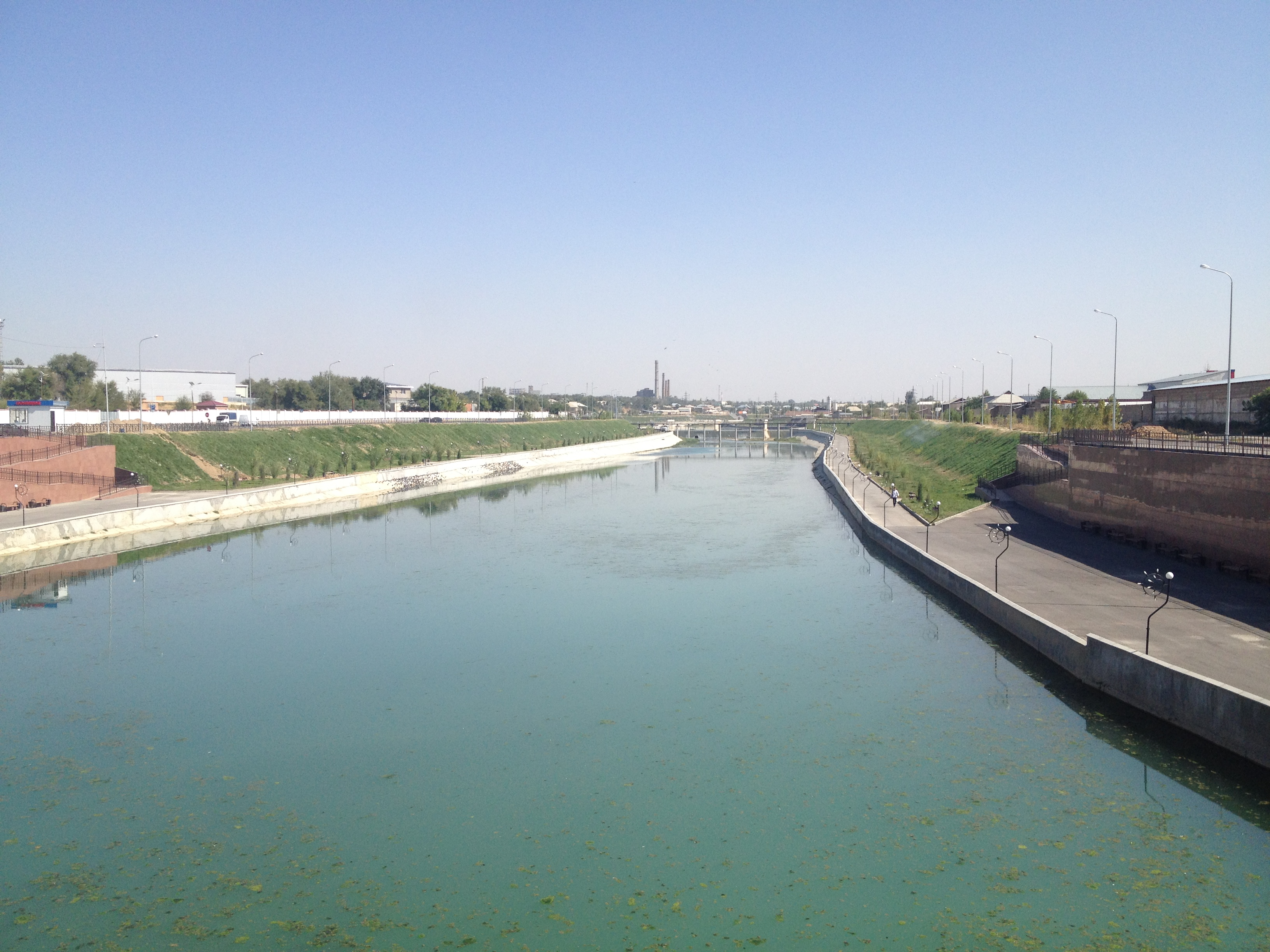 Река Бадам в городе Шымкент, в сентябре